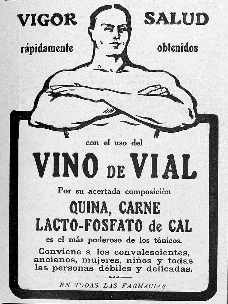 Vino de Vial.